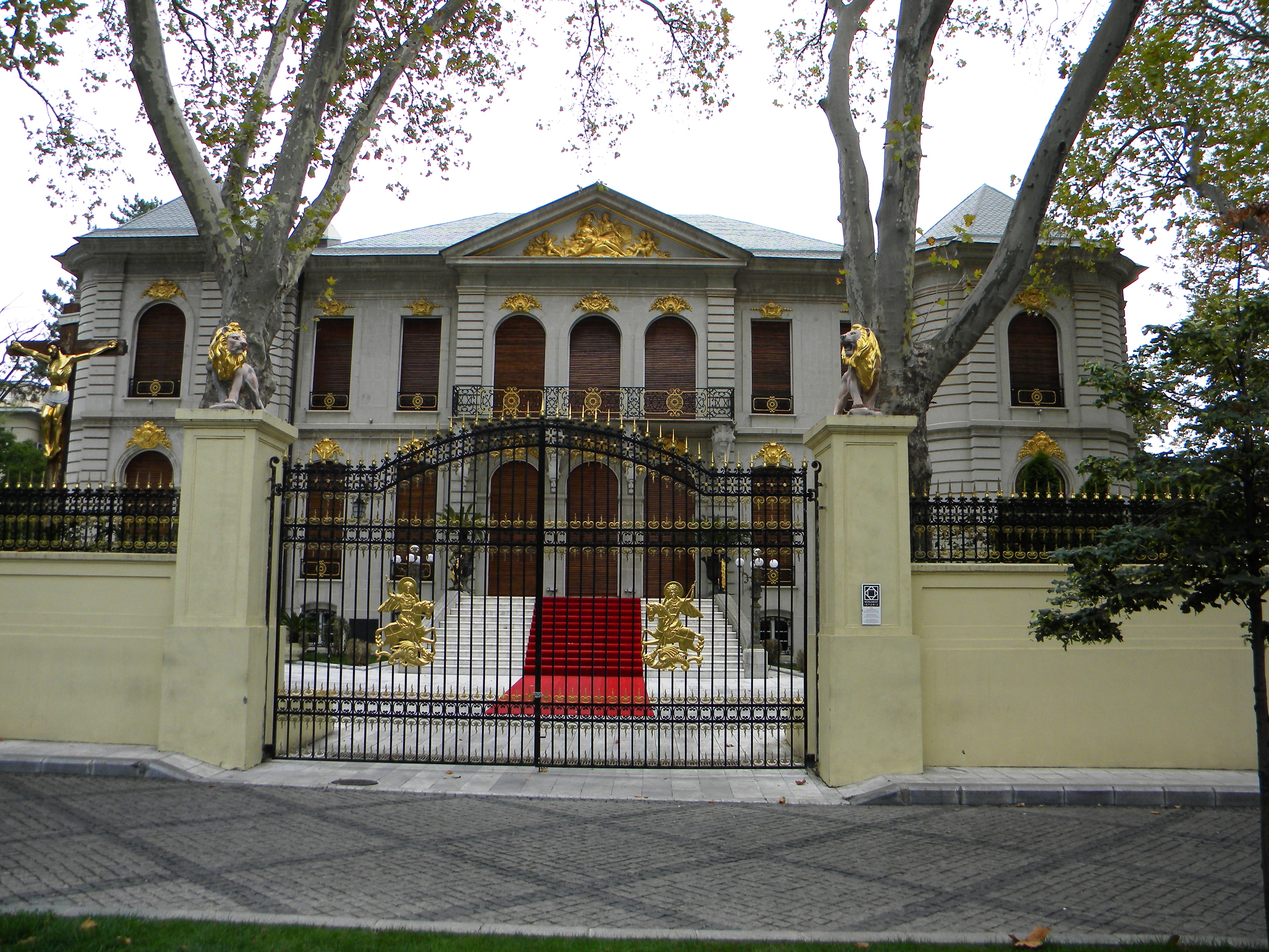 Bucuresti, Romania, Aleea Modrogan nr. 2 (Vila); B-II-m-B-19228 (Casa Manu-Auschnitt) (1)